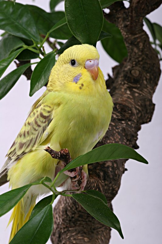 Melopsittacus undulatus